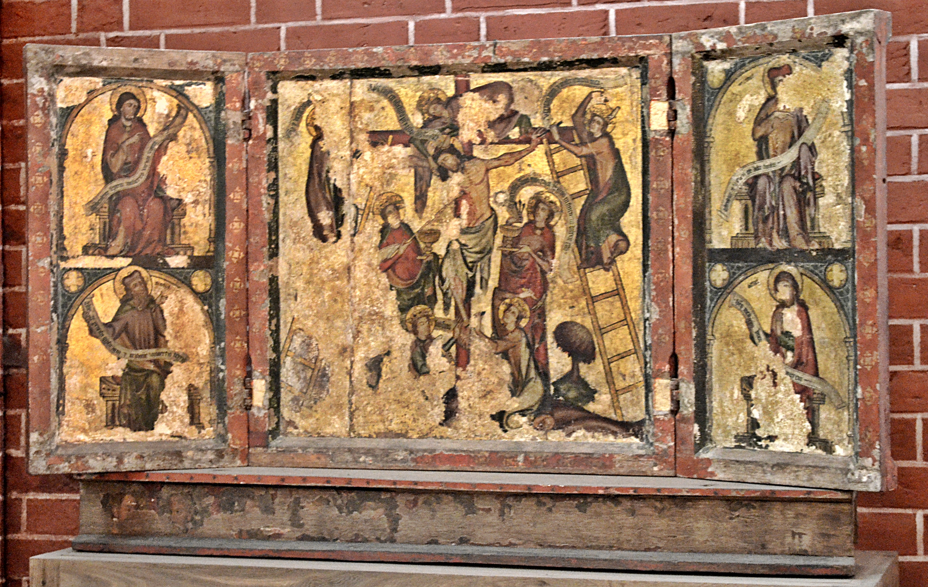 Bad Doberan, Münster, Retabel Kreuzigung Christi durch die Tugenden, um 1320. S